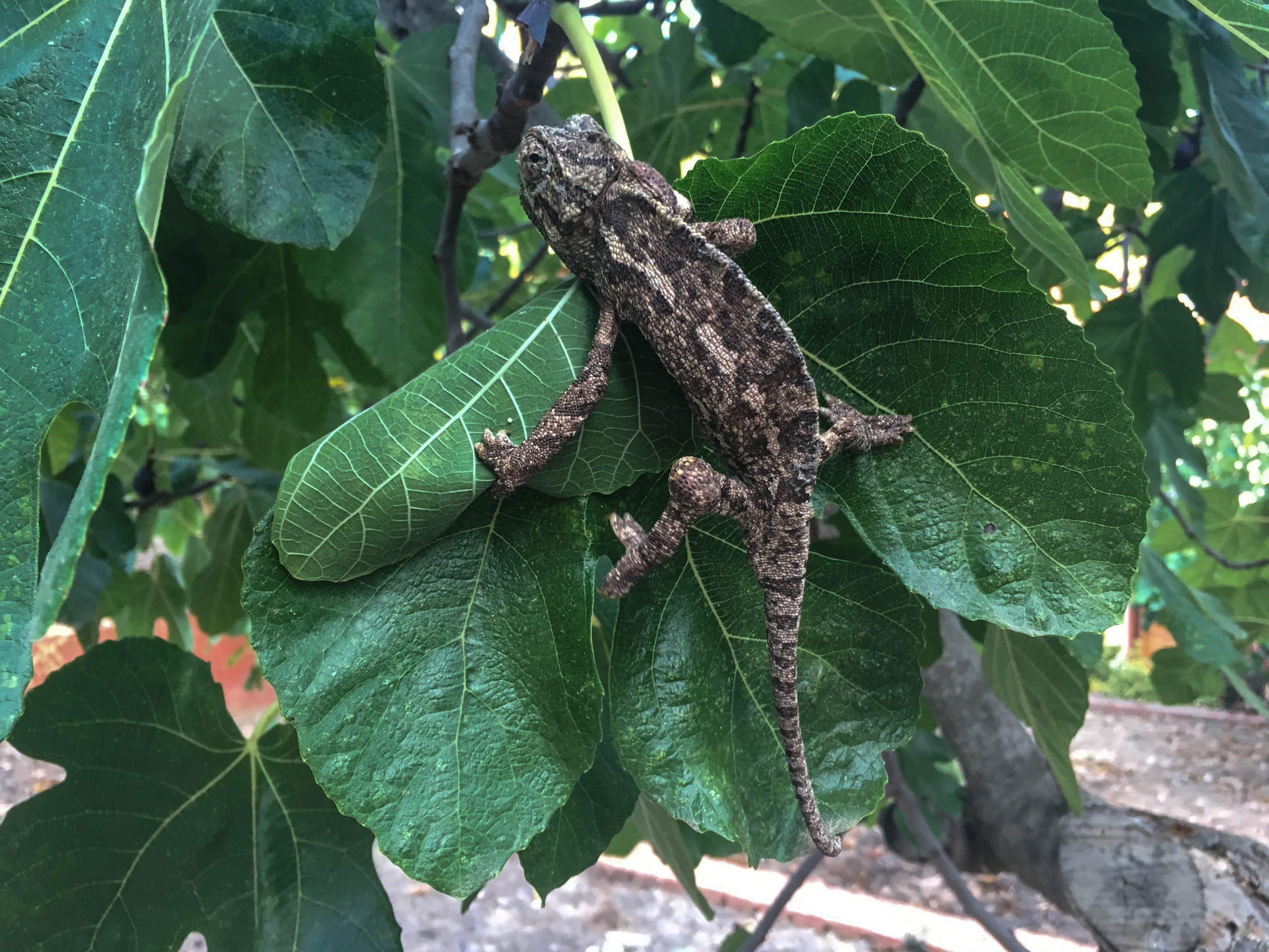 Montes de Málaga This is a photography of a Special Area of Conservation in Spain with the ID: ES6170038. Natura2000 entry, EEA entry